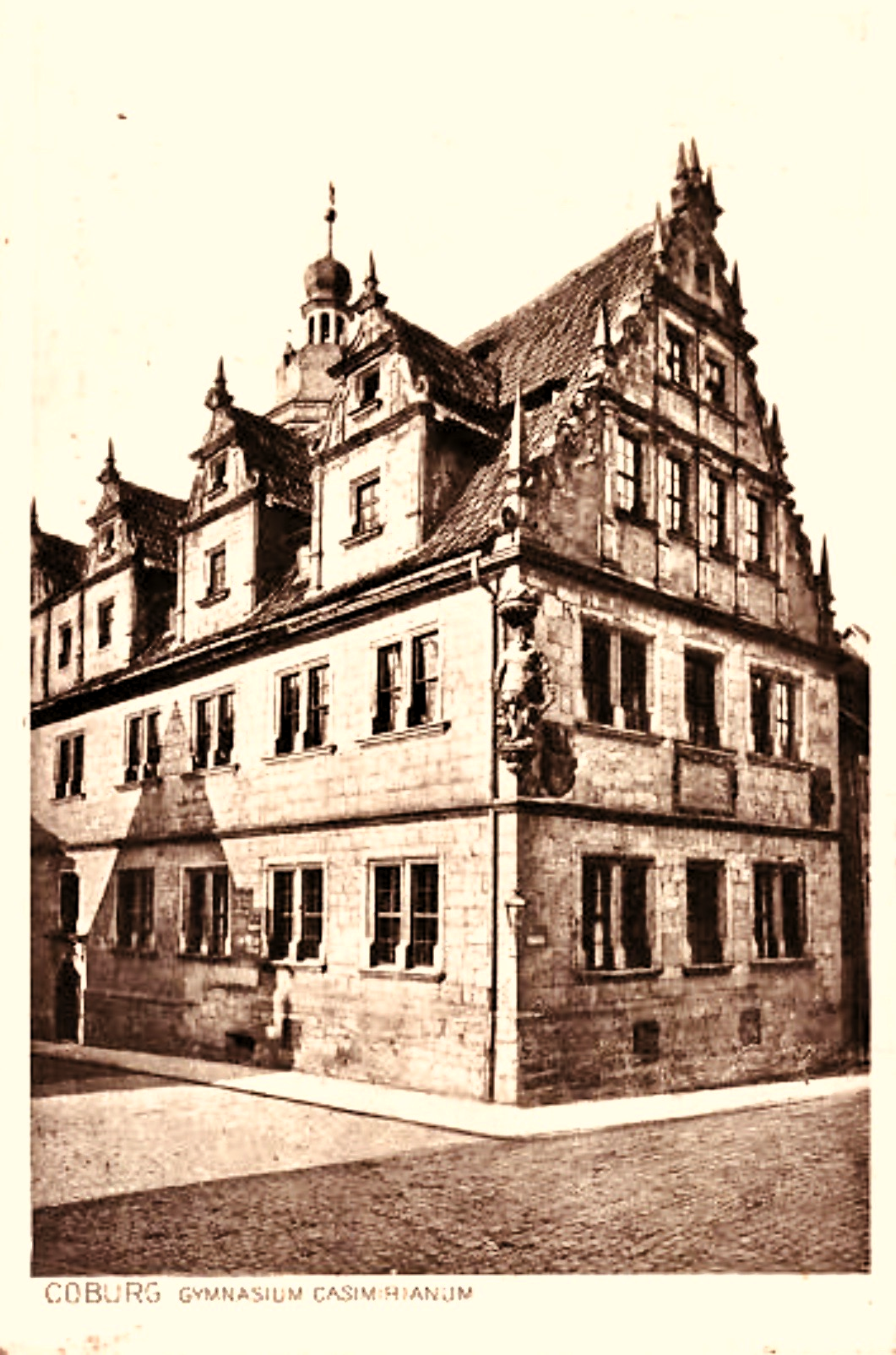 Casimirianum Coburg, humanistisches Gymnasium, altsprachlich